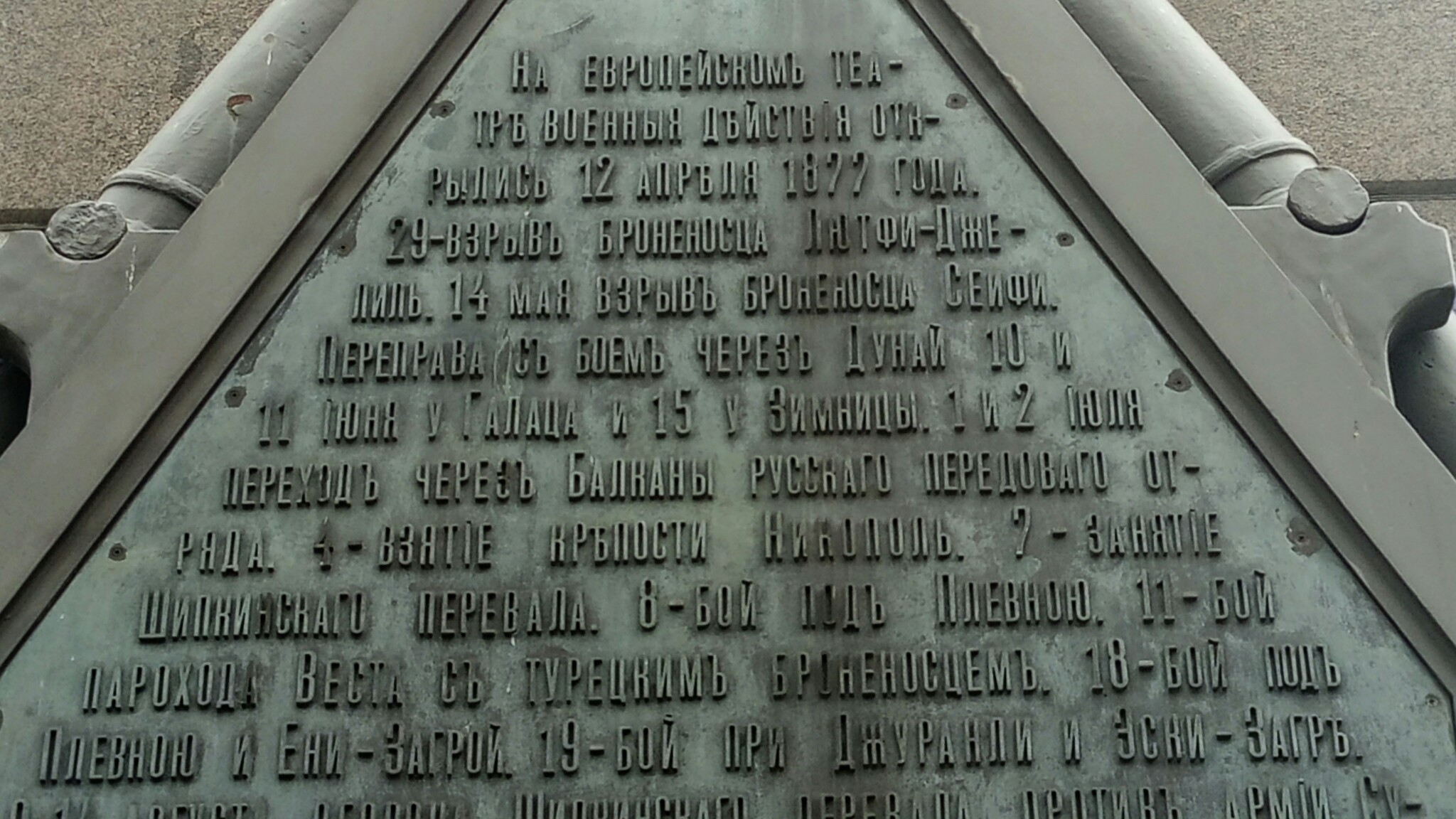 Северная сторона памятника Славы на Измайловском проспекте. "На европейском театре военные действия открылись 12 апреля 1877 года. 29 - взрыв броненосца Лютфи-Джелиль. 14 мая взрыв броненосца Сейфи. Переправа с боем через Дунай 10 и 11 июня у Галаца и 15 у Зимницы. 1 и 2 июля переход через Балканы русского передового отряда. 4 - взятие крепости Никополь. 7 - занятие Шипкинского перевала. 8 - бой под Плевною. 11 - бой парохода Веста с турецким броненосцем. 18 - бой под Плевною и Ени-Загрой. 19 - бой при Джуранли и Эски-Загр."